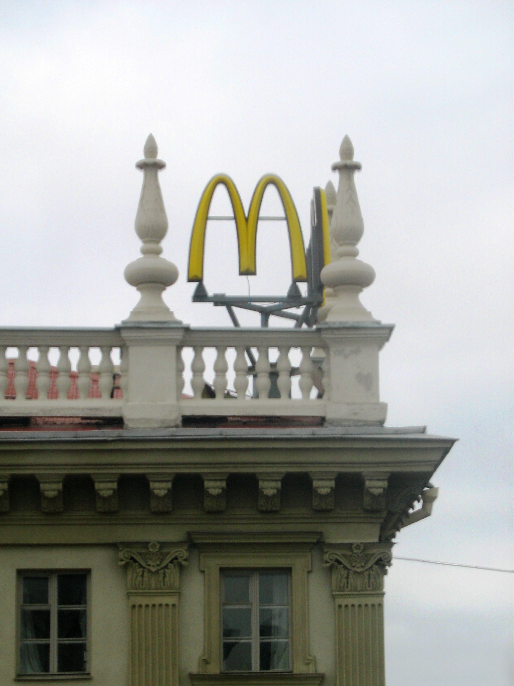 Акратэрыі на адным з гмахаў праспэкту Незалежнасьці ў Менску